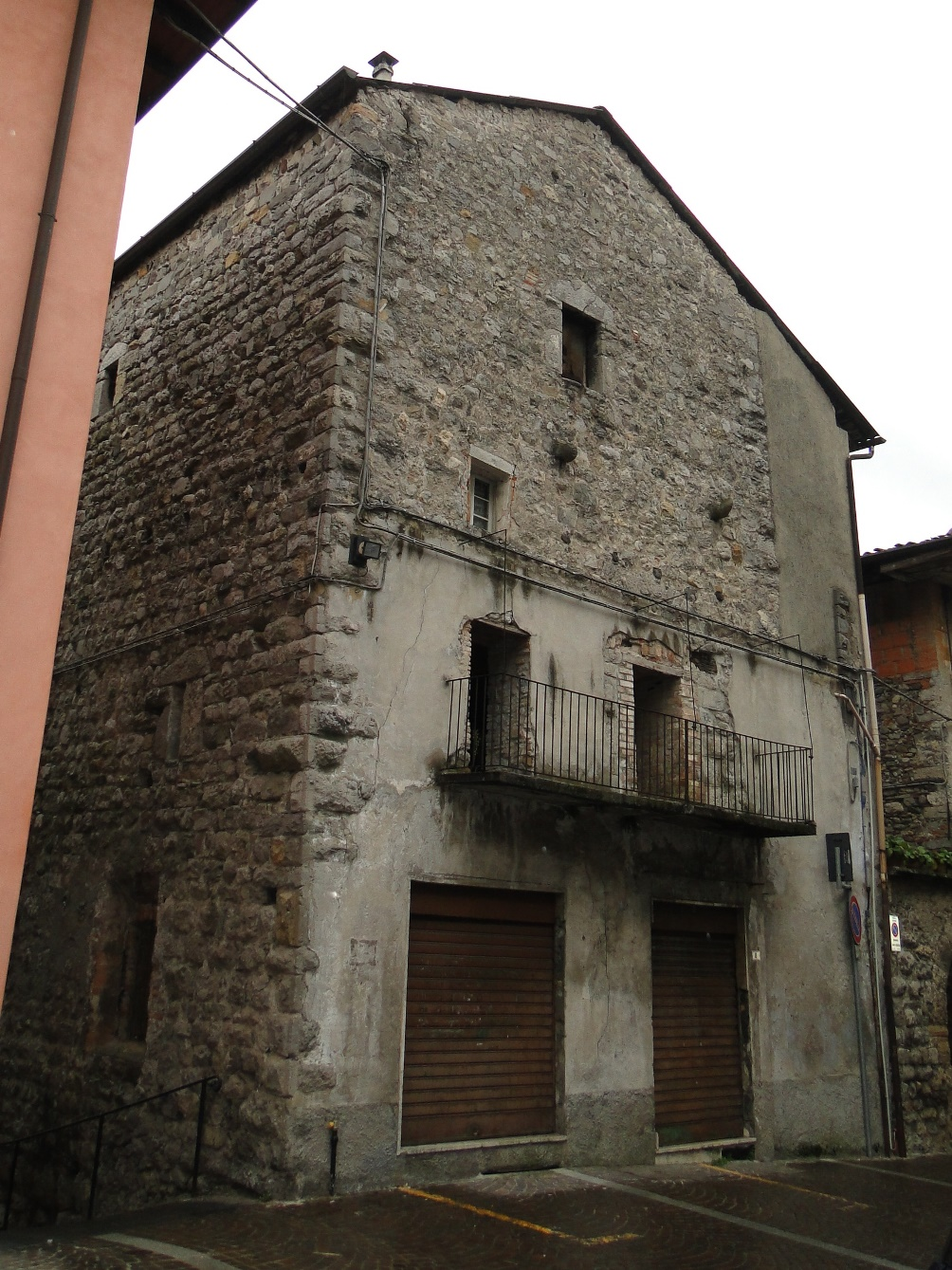 Casa torre, XII sec. Sede comunale dal XIII al XV secolo. Vertova (BG). Italia